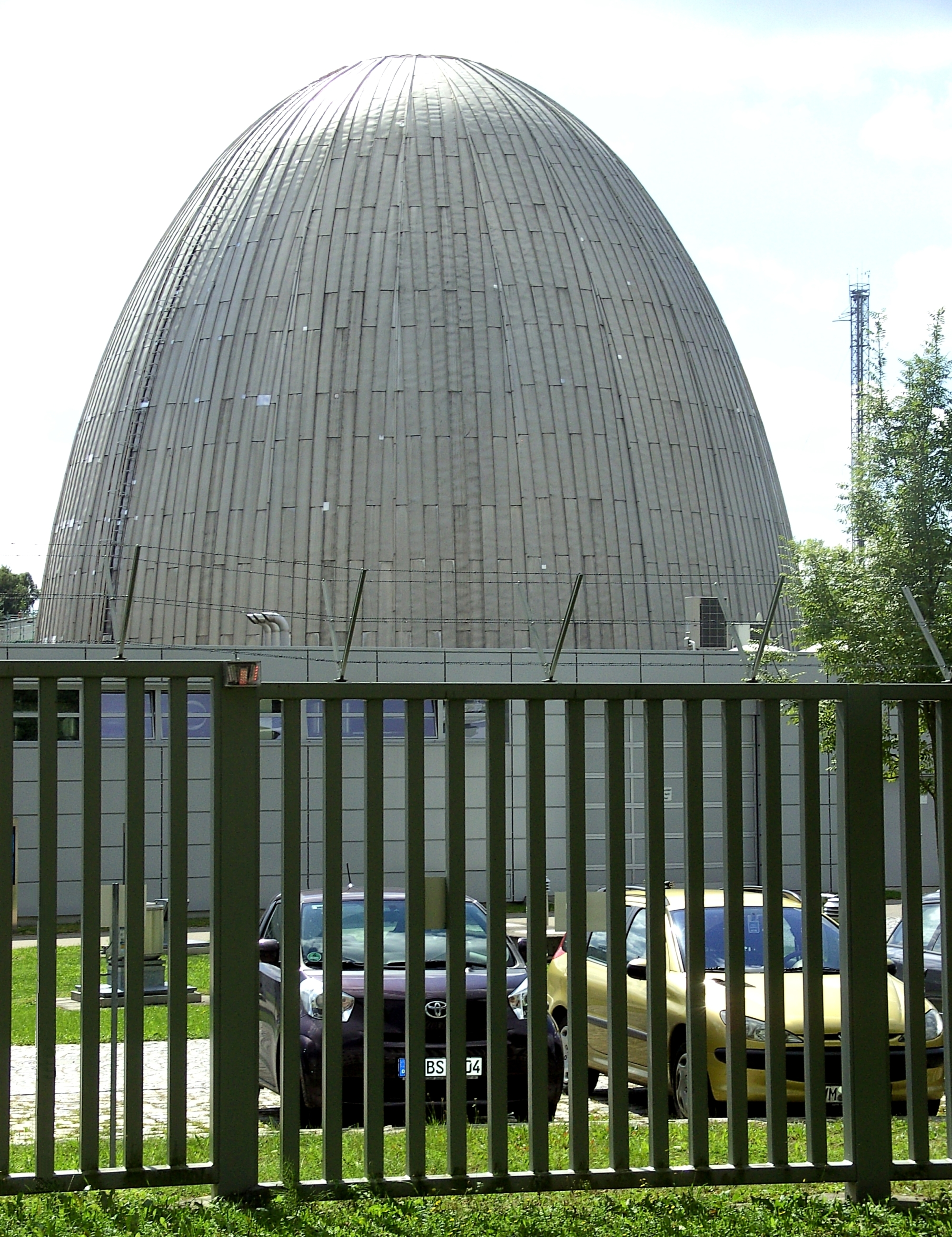 Der Forschungsreaktor München I (FRM I) oder das Atomei von Garching auf dem Gelände der Technischen Universität München (TUM).; Denkmalnummer 313341; Aktennummer D-1-84-119-13